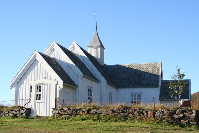 Øksnes kirke